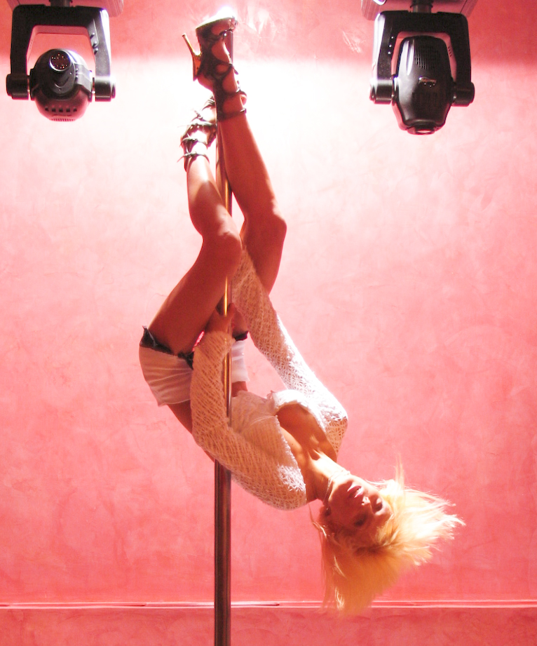 Striptease pole dancing in Belovskaya, Belgorodskaya Oblast, Russia.